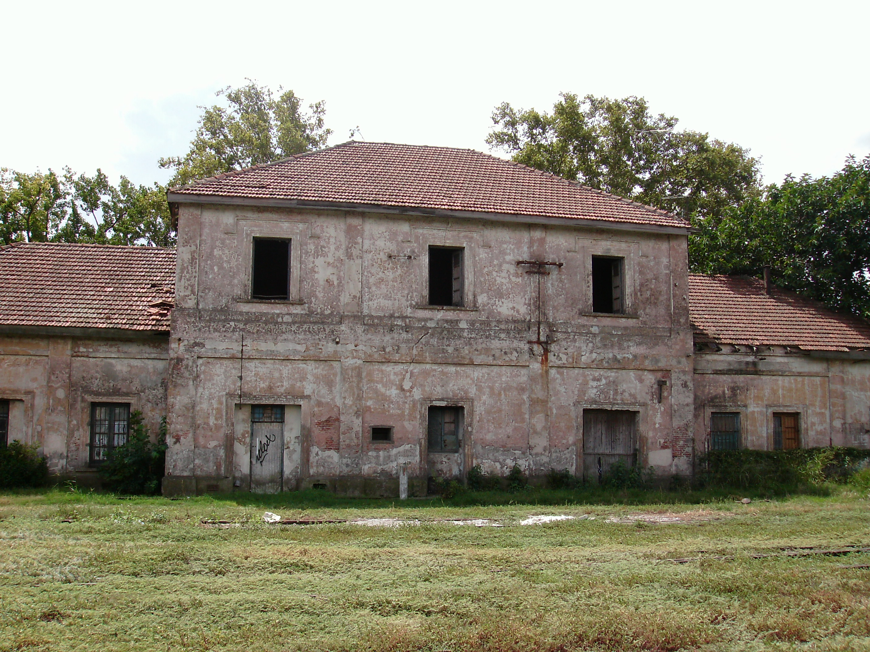 Antigua estacion de Campana.